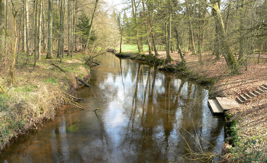 Lachte_westlich von Lachendorf The River Lachte west of Lachendorf, Lower Saxony, Germany.